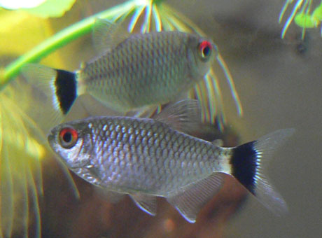 Moenkhausia sanctaefilomenae; Redeye tetra; Rotaugen-Moenkhausia